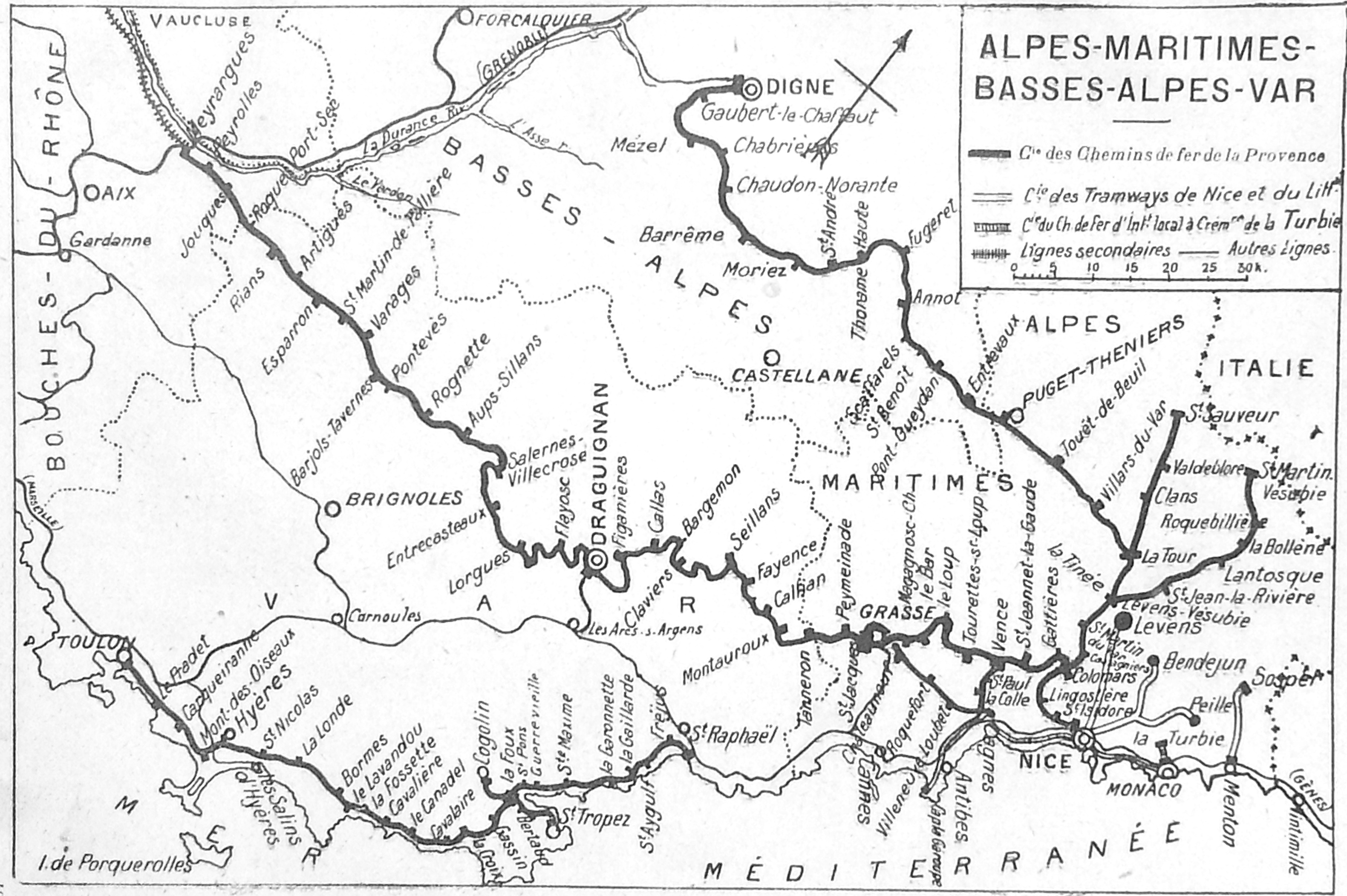 Plan du réseau des VFIL des Basses-Alpes et du Var en 1928